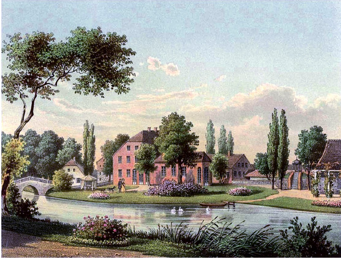 Gut Lablacken, Kreis Labiau, Provinz Preußen, (Nikitovka) Lithographie von Alexander Duncker, 1869